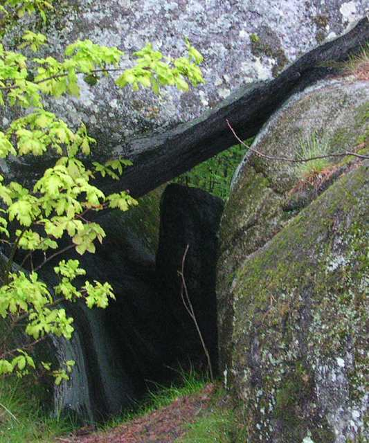 Jomfruburet på Jomfruhalvøya i Farris, Larvik